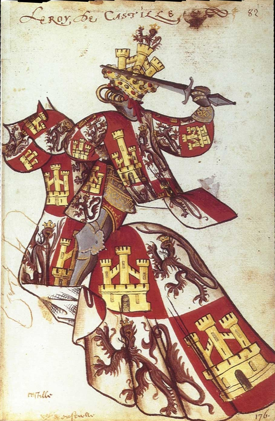 de Castille) Juan II con el señal real en sobreveste y gualdrapas del caballo en el Armorial ecuestre del Toison d'Or. Flandre, ca. 1433-1435. Procedente de los Agustinos descalzos de Lyon que perteneció a Jean Lefèvre de Santo-Rémy. Bibliothèque nationale de France. Temple sobre pergamino. París, Bibliothèque de l’Arsénal, ms. 4790, f. 108r, miniatura núm. 228.